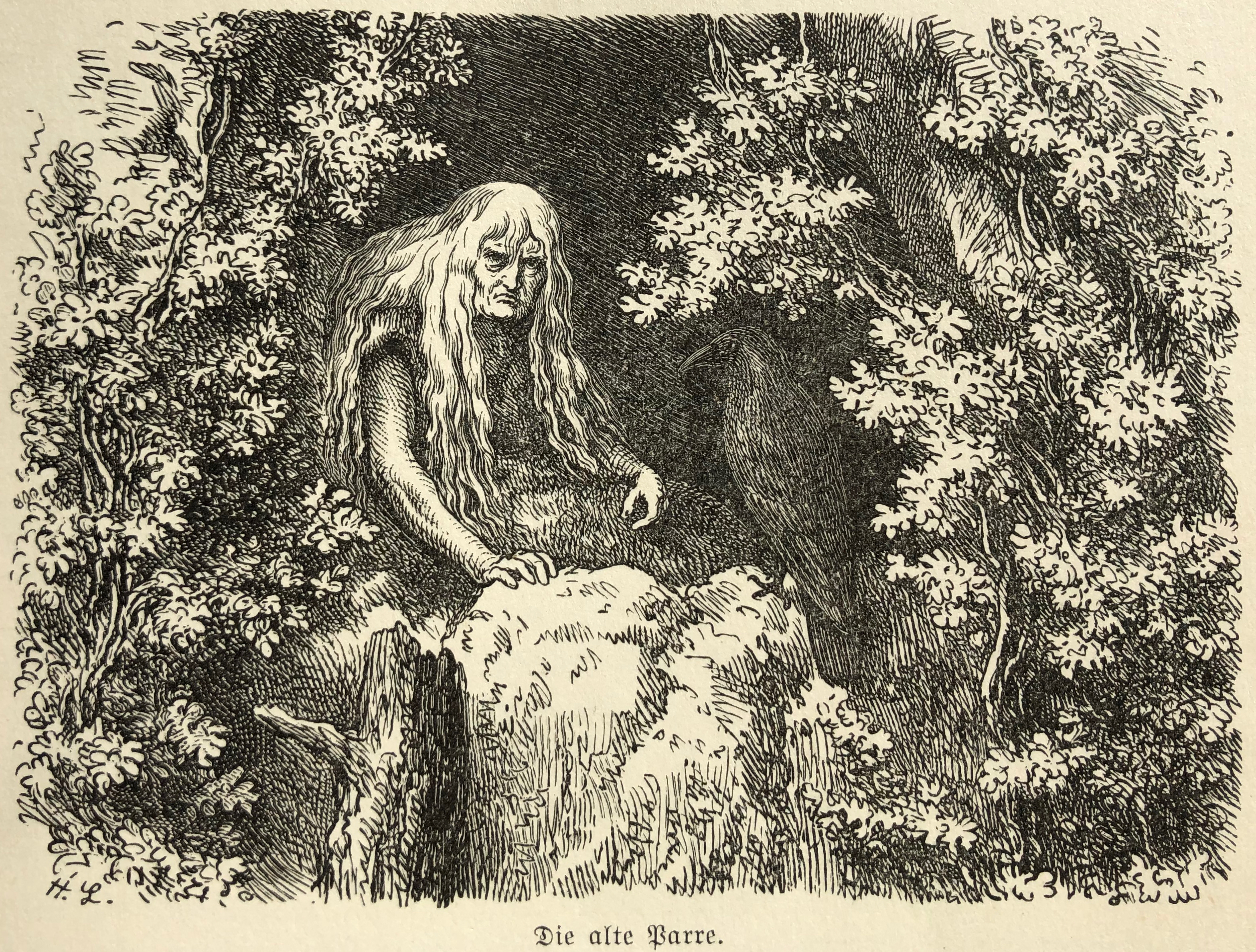 Illustrationen von Heinrich Leutemann aus dem Buch "Rulaman" von David Friedrich Weinland.